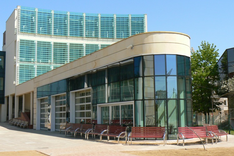 Klub Studencki "Zemsta Docenta" Wyższej Szkoły Prawa i Administracji w Rzeszowie